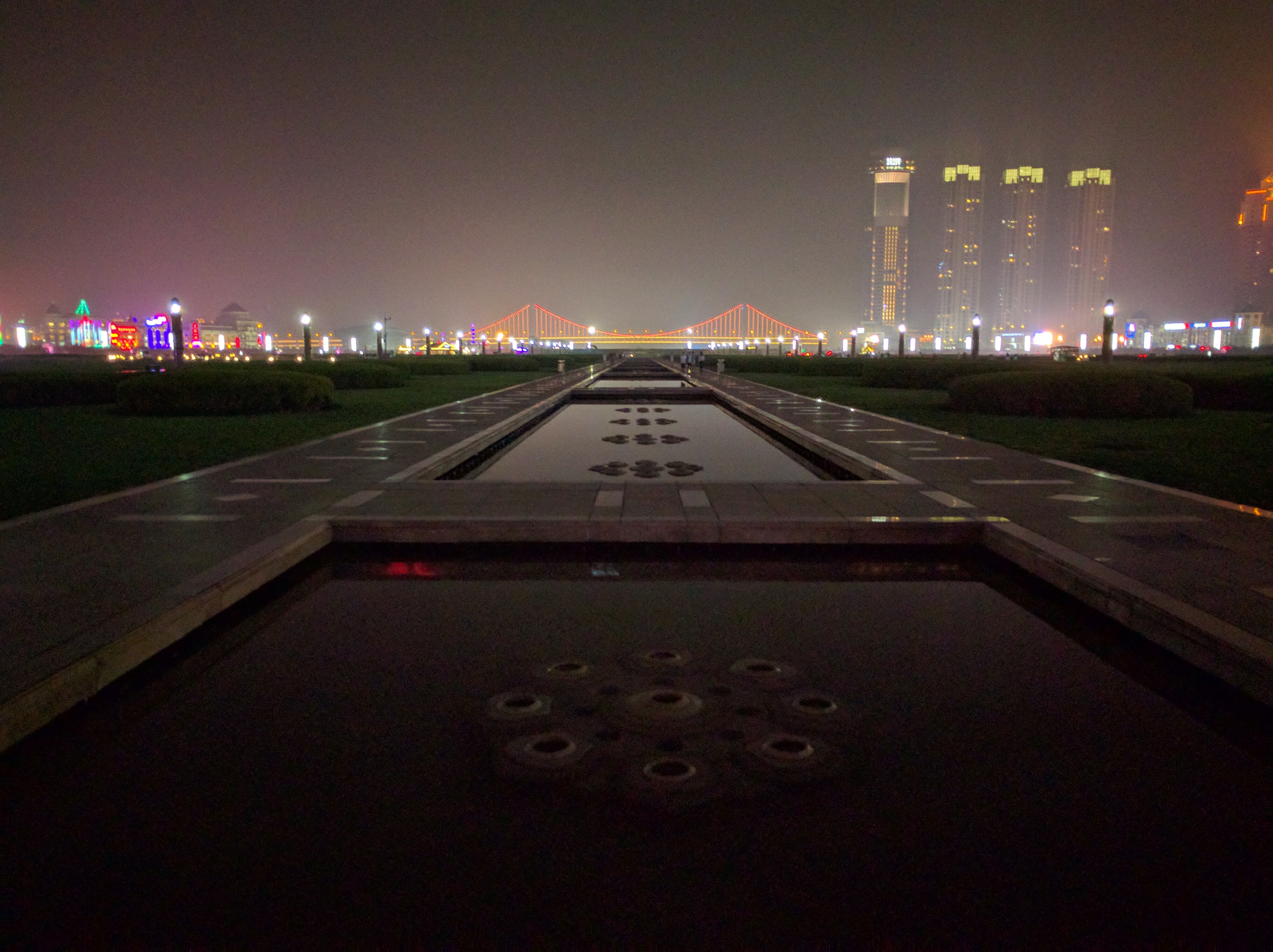 中文（中国大陆）: 大连市星海广场